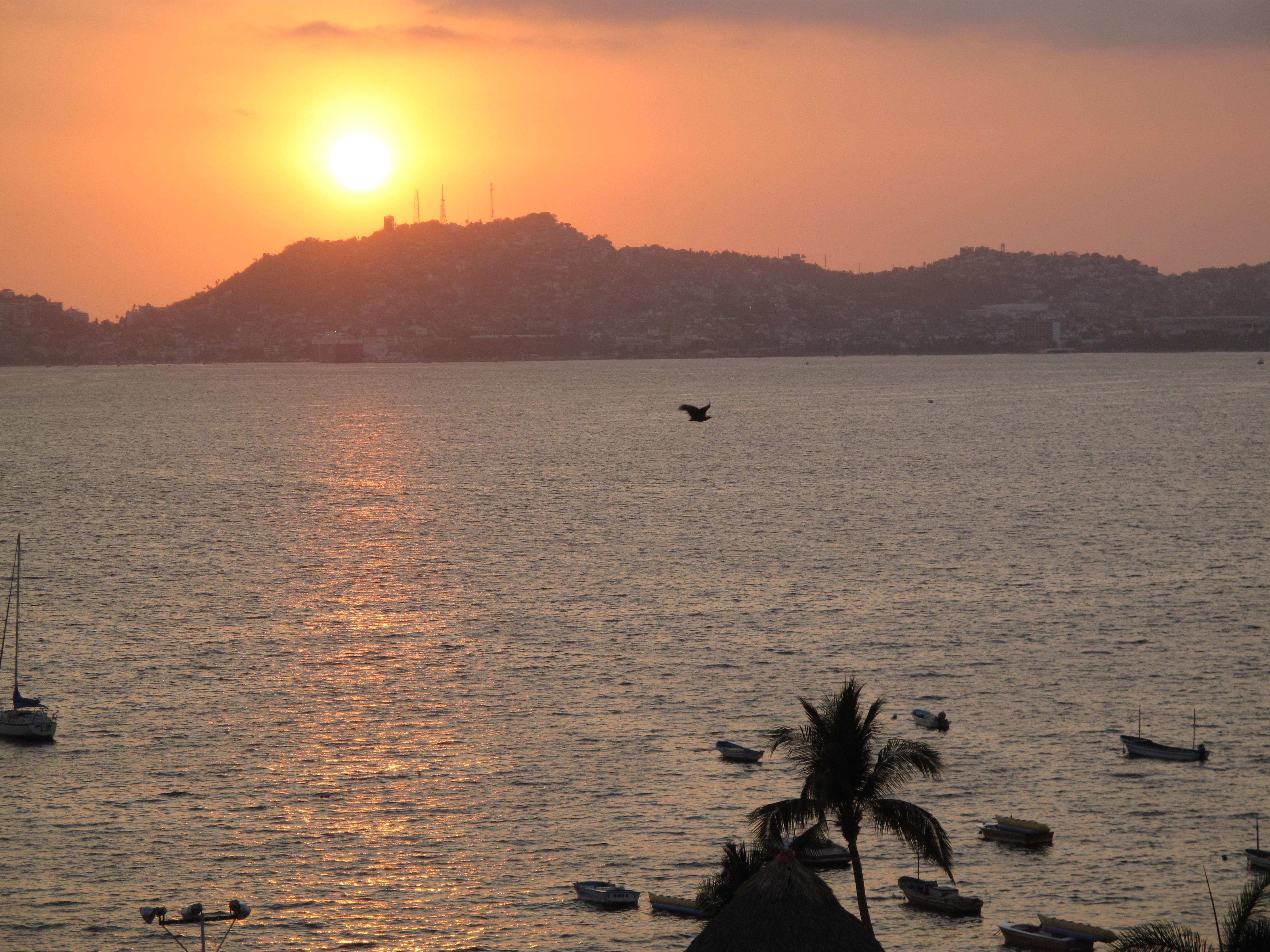 La page à Acapulco.